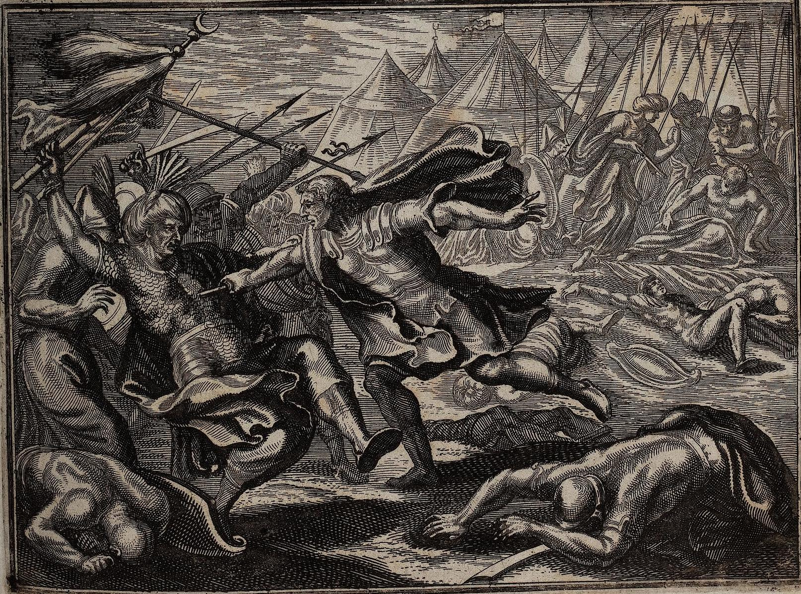 Гравюра из немецкого издания "Истории" Рико. Милош Обилич убивает Мурада.